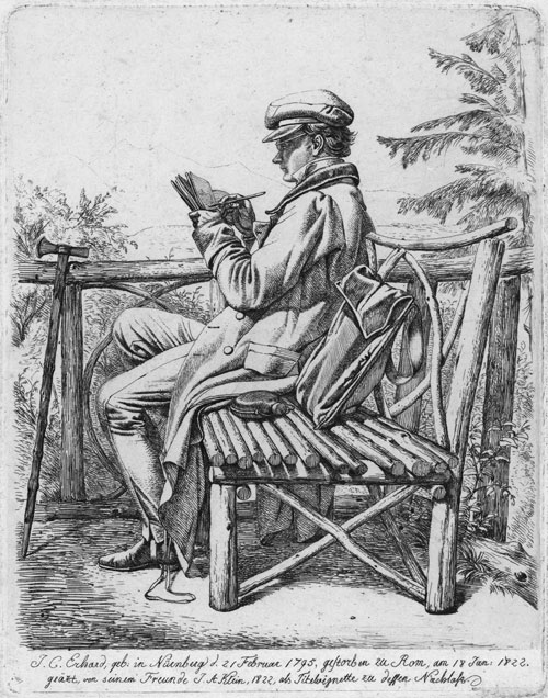 Porträt Johann Christian Erhard, auf einer Bank im Park Aigen bei Salzburg (etching on velin paper, 14,8 x 11,5 cm)